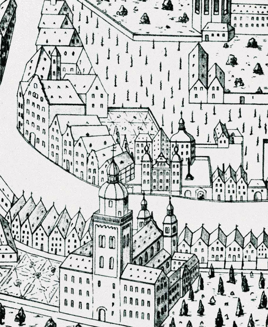 Köln um 1702, im Vordergrund St. Mariae Himmelfahrt, gegenüber Gymnasium „Tricoronatum“